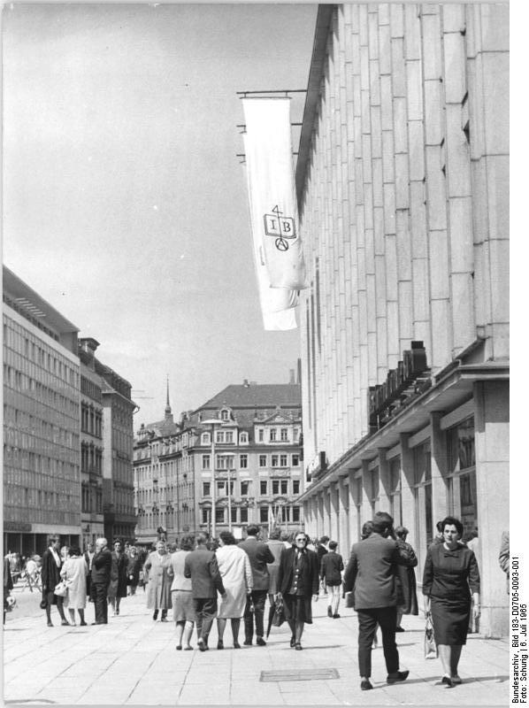 Leipzig, Messehaus Zentralbild Schurig 6.7.1965 Internationale Buchkunstausstellung in Leipzig Die Internationale Buchkunstausstellung, die in den 4 Etagen des Leipziger Messehaus am Markt fast 4000 Kostbarkeiten der Buchkunst und Grafiken aus 5 Kontinenten beherbergt, wurde am 3. Juli eröffnet. UBz: Aussenansicht vom Leipziger Messehaus am Markt.